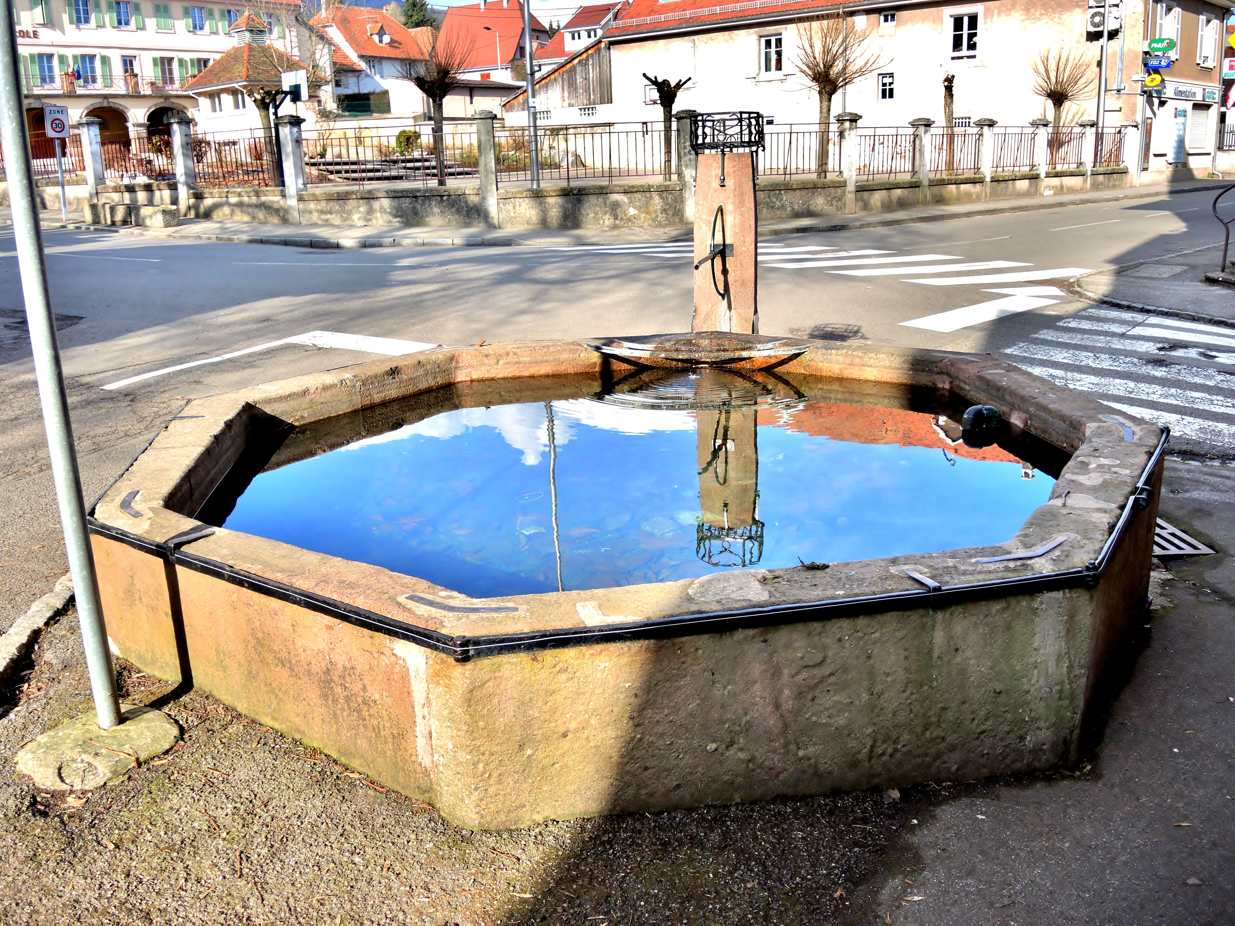 Fontaine de Gohr. Village de Wattwiller, Haut-Rhin.